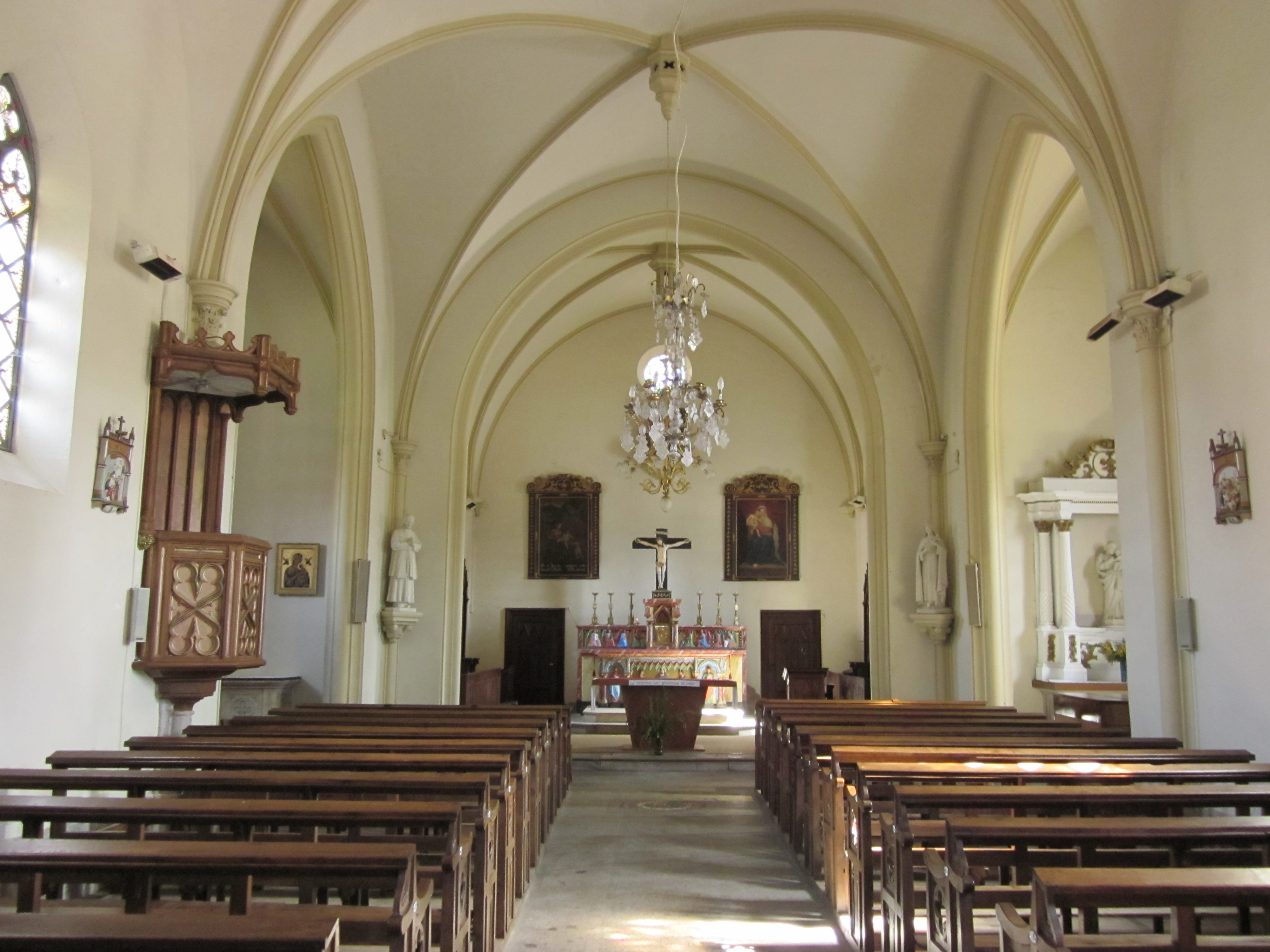 Vannoz (Jura) - église - intérieur (nef et autel)